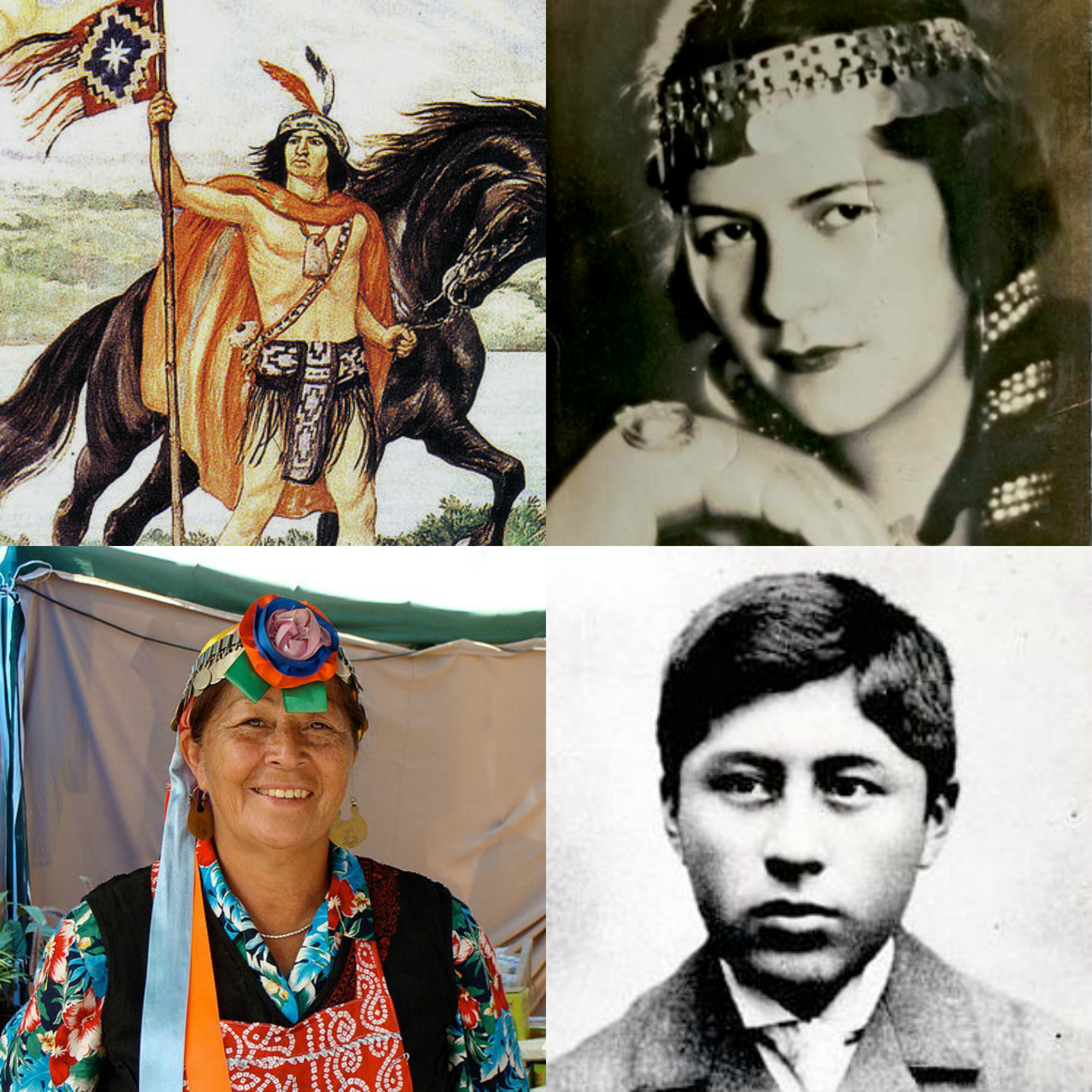 Montaje de gente mapuche (Lautaro, Rayén Quitral, mujer mapuche de Chile, Ceferino Namuncurá) en base a: Lautaro Rayén Quitral Mujer mapuche de Chile Ceferino Namuncurá